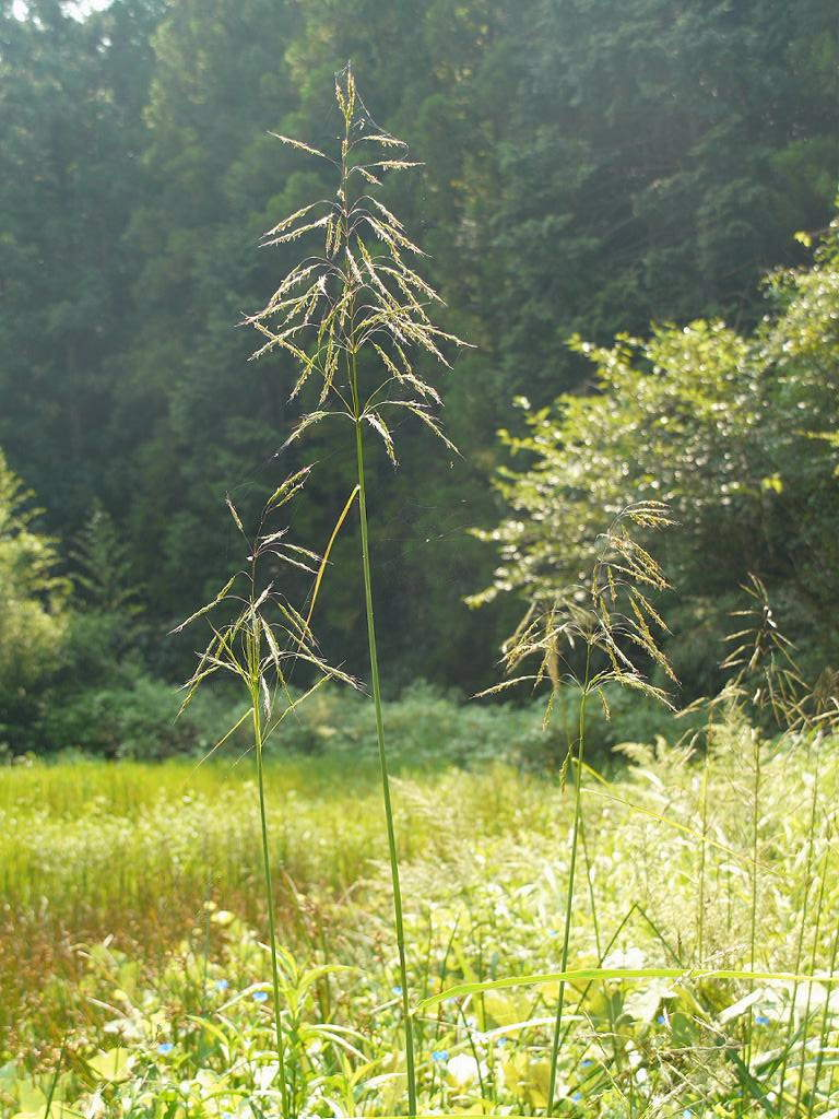 Eccoilopus cotulifer (アブラススキ)